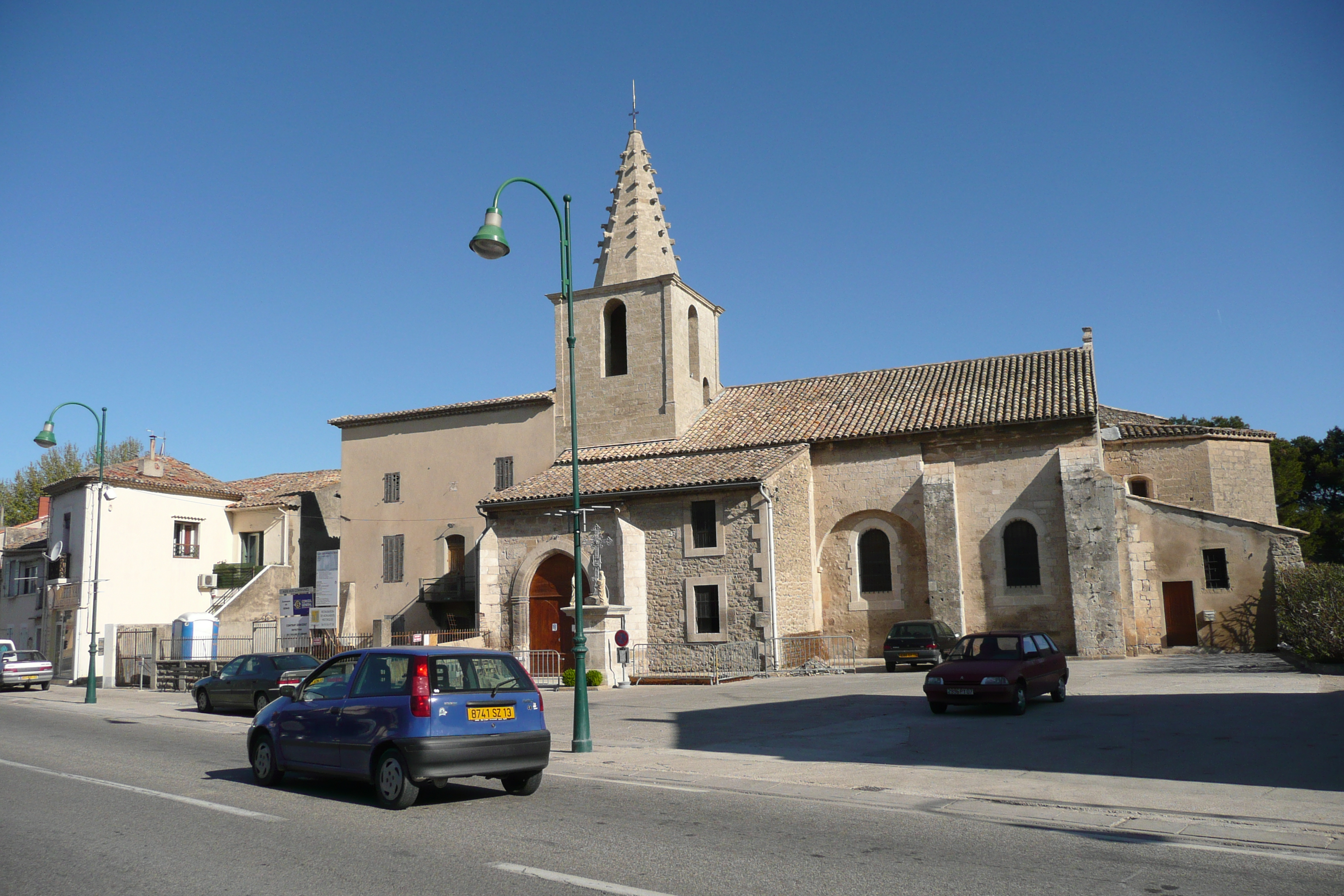 Eglise à Sénas.